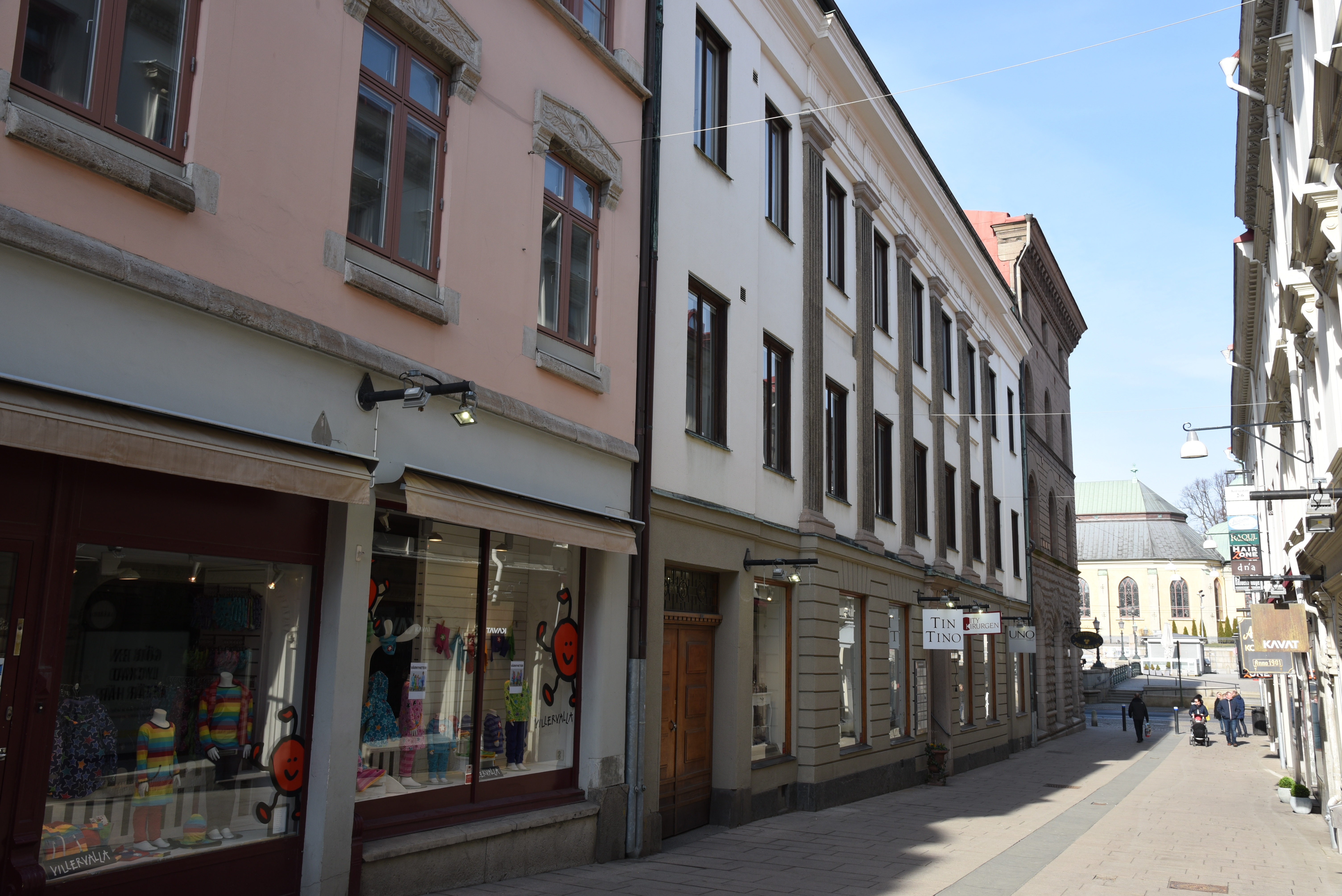 Korsgatan 3 i kvarteret Kommerserådet i stadsdelen Inom Vallgraven i Göteborg.Byggnaden uppfördes år 1804 för apoteket Cronan. Det ritades troligen av fortifikationskaptenen J F Weinberg.